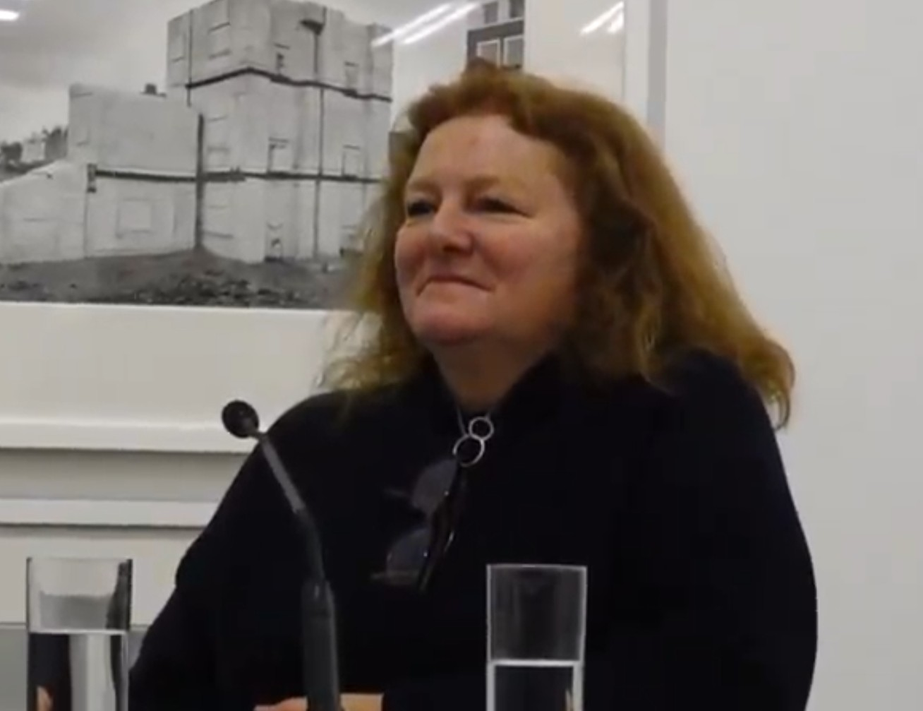 Ausschnitte aus dem Pressegespräch zur Ausstellung Rachel Whiteread im Belvedere21 in deutscher Sprache.